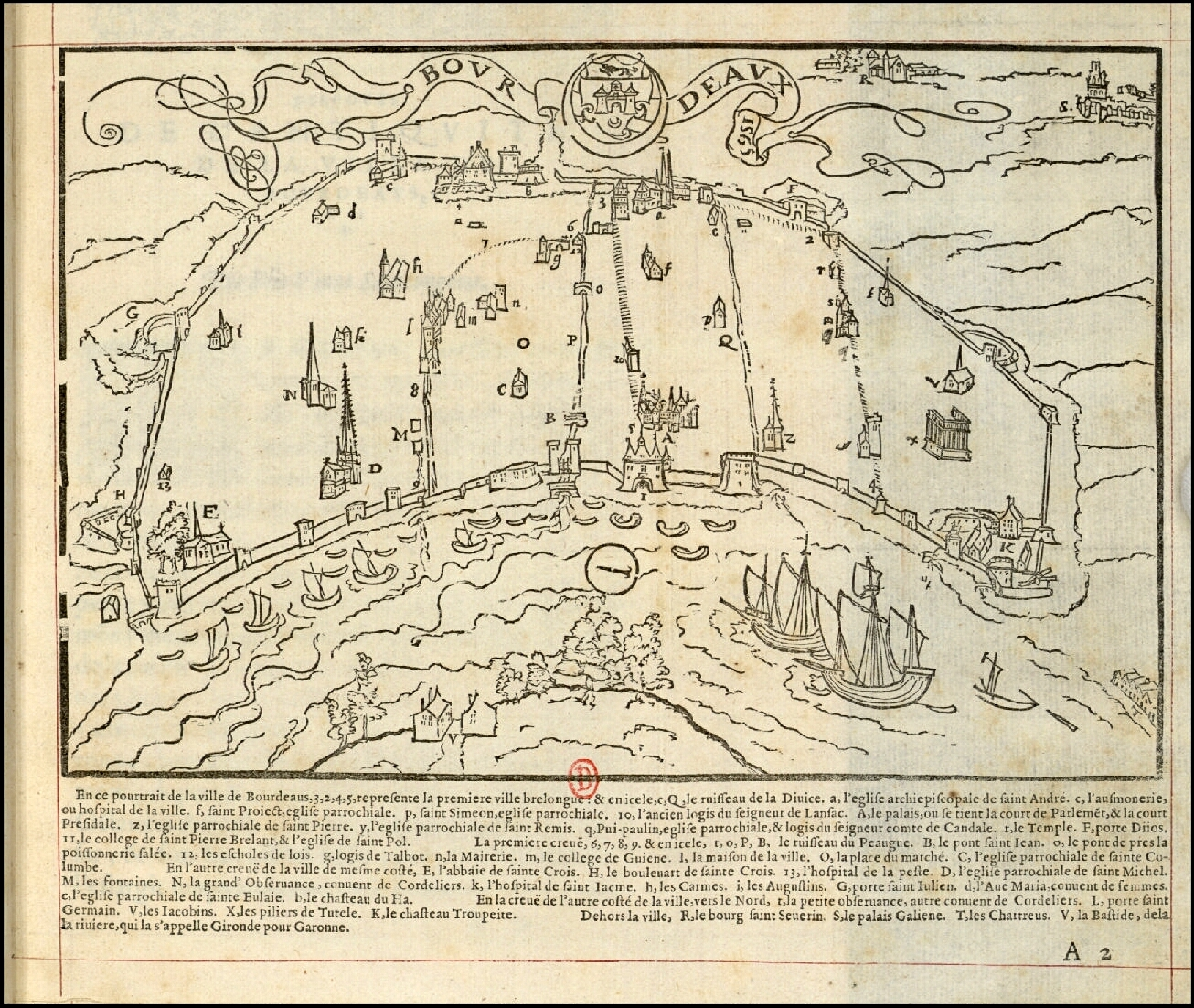 Vinet Antiqvité de Bordeavs plan de la ville (1574)